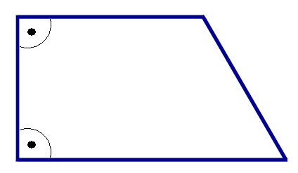 trapez prostokątny / a trapezium with two 90° degrees